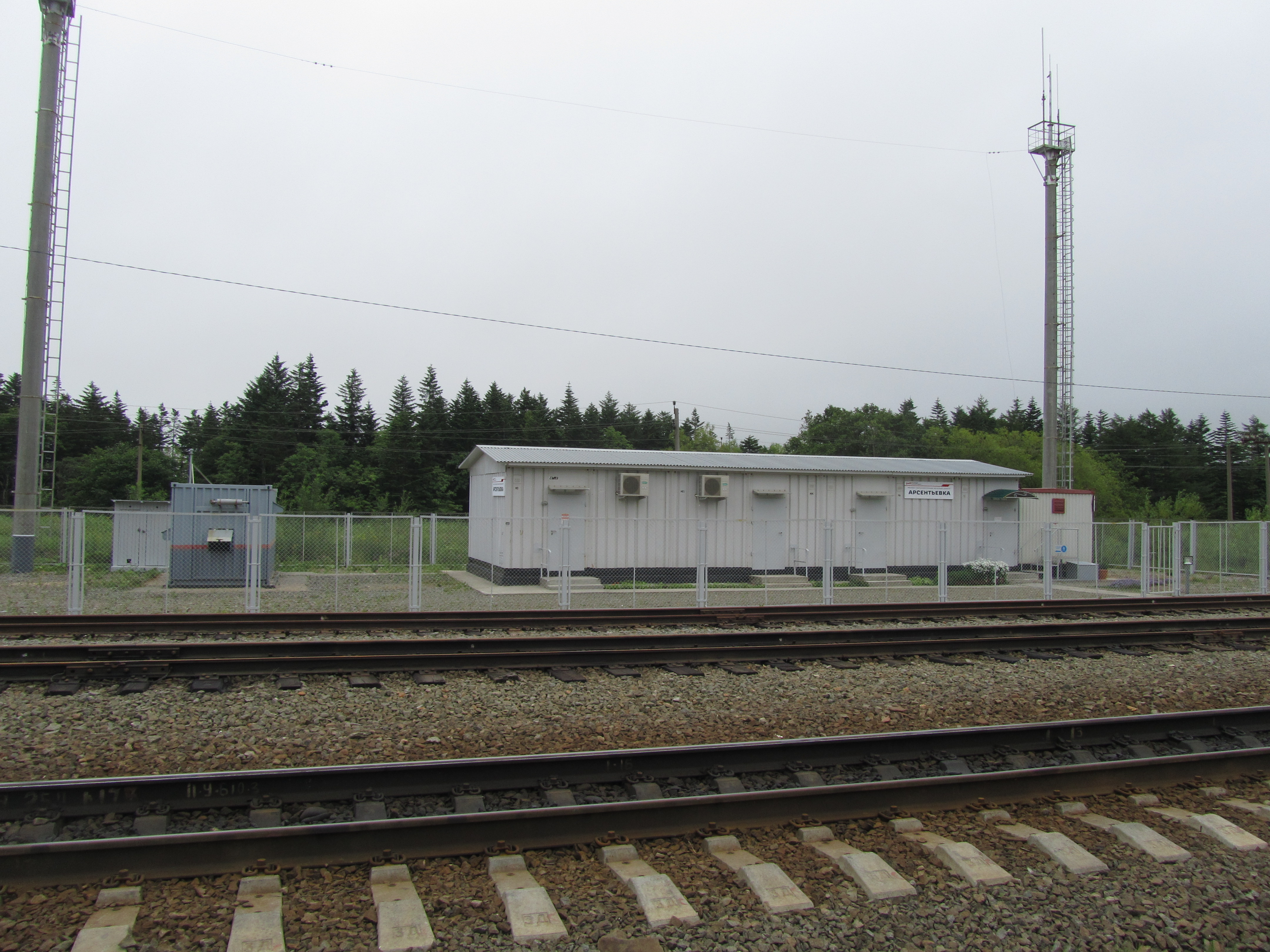 Станция Арсентьевка Сахалинского региона двжд